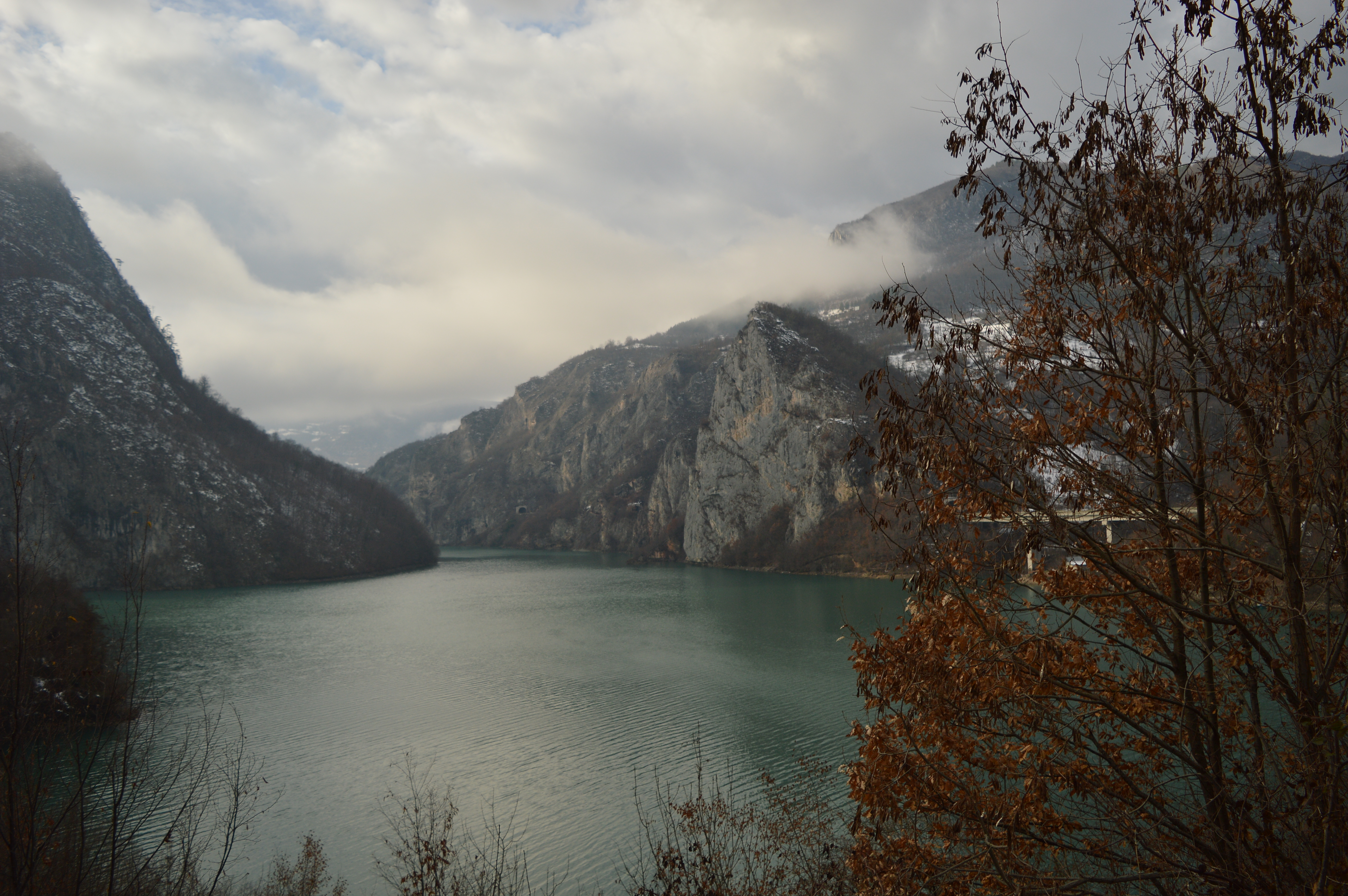 Brodar